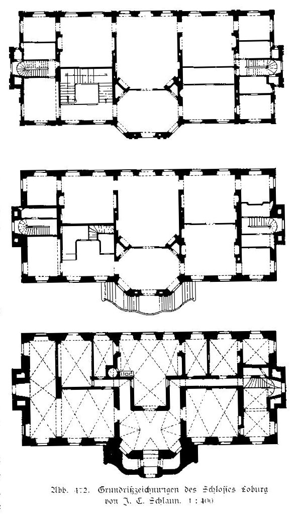 Grundriss des alten Schlosses Loburg vor dem Brand, nach Schlaun